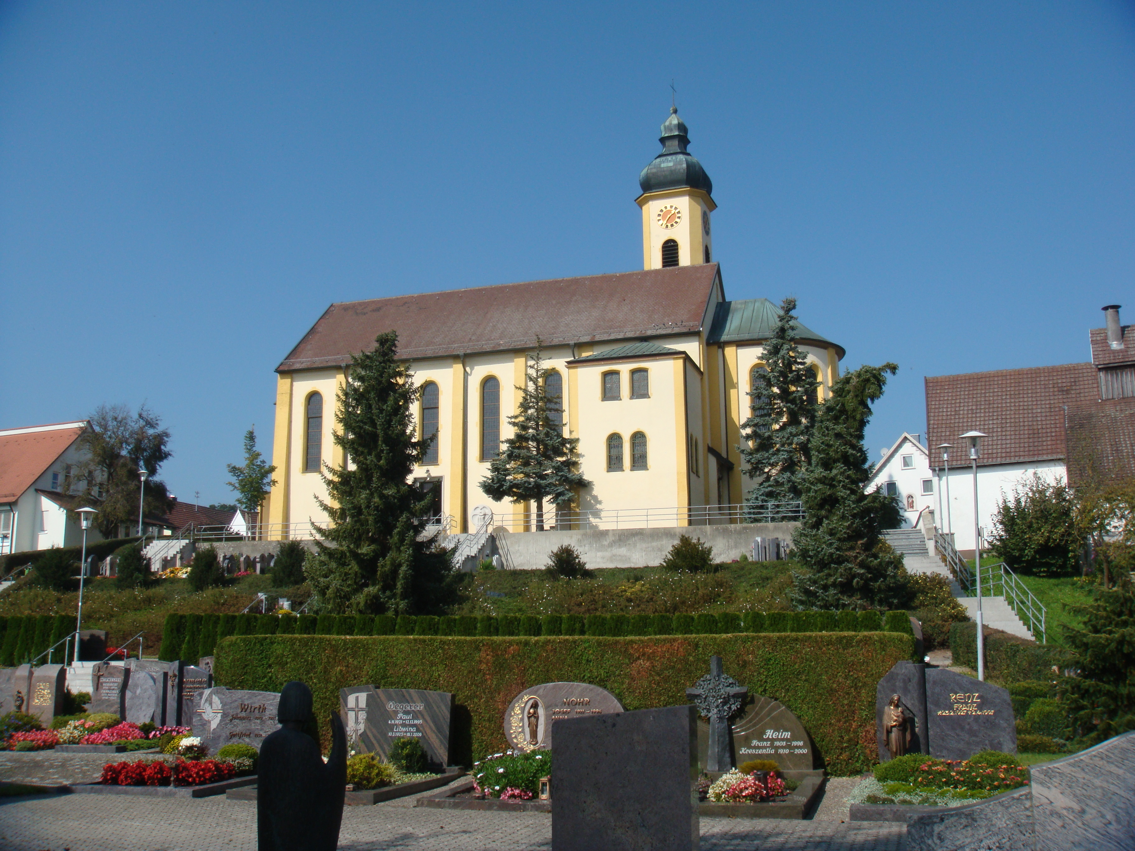 Dorfkirche in Schnürpflingen von Süden